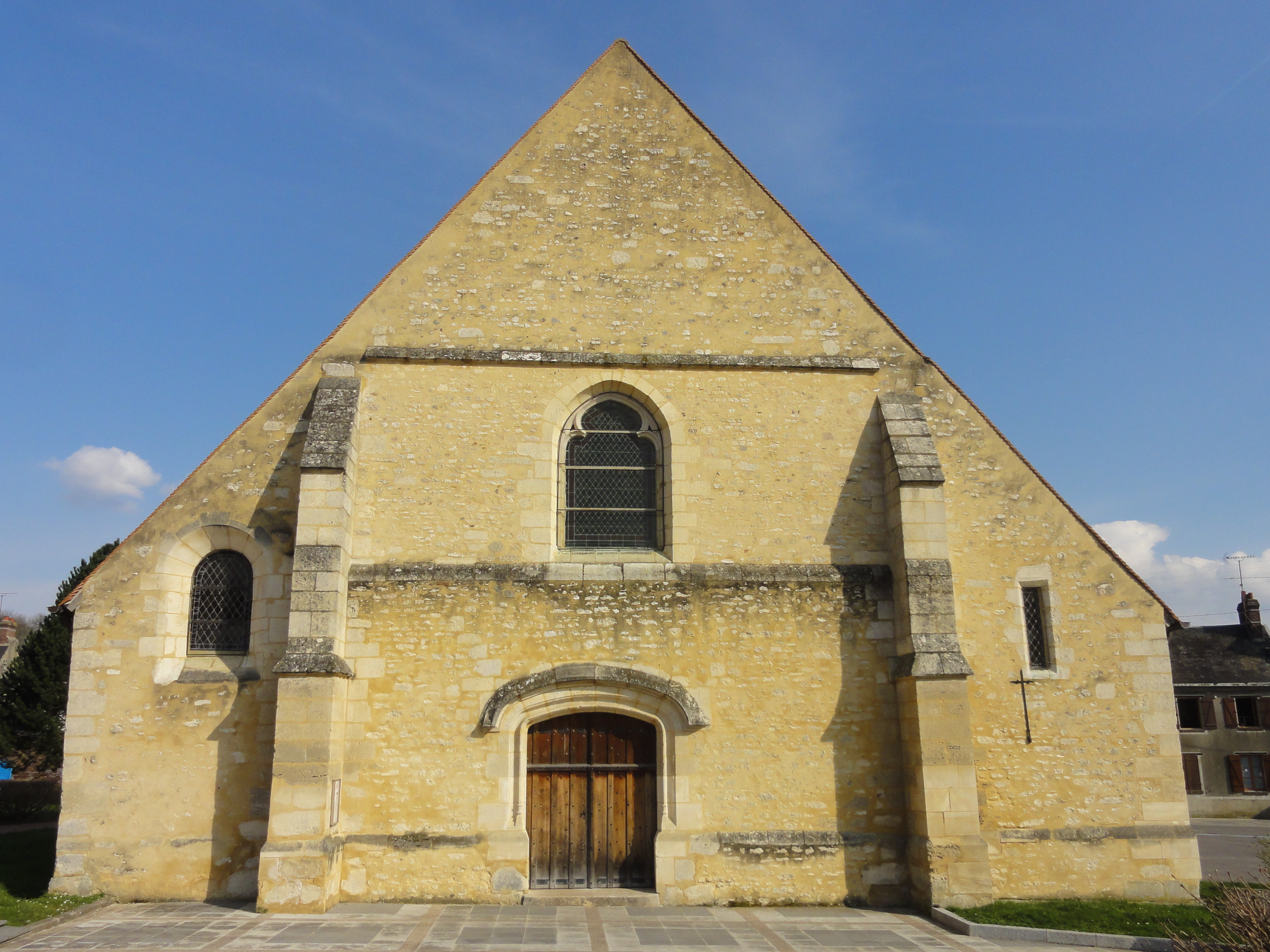 Église Saint-Denis de Bornel - voir titre.